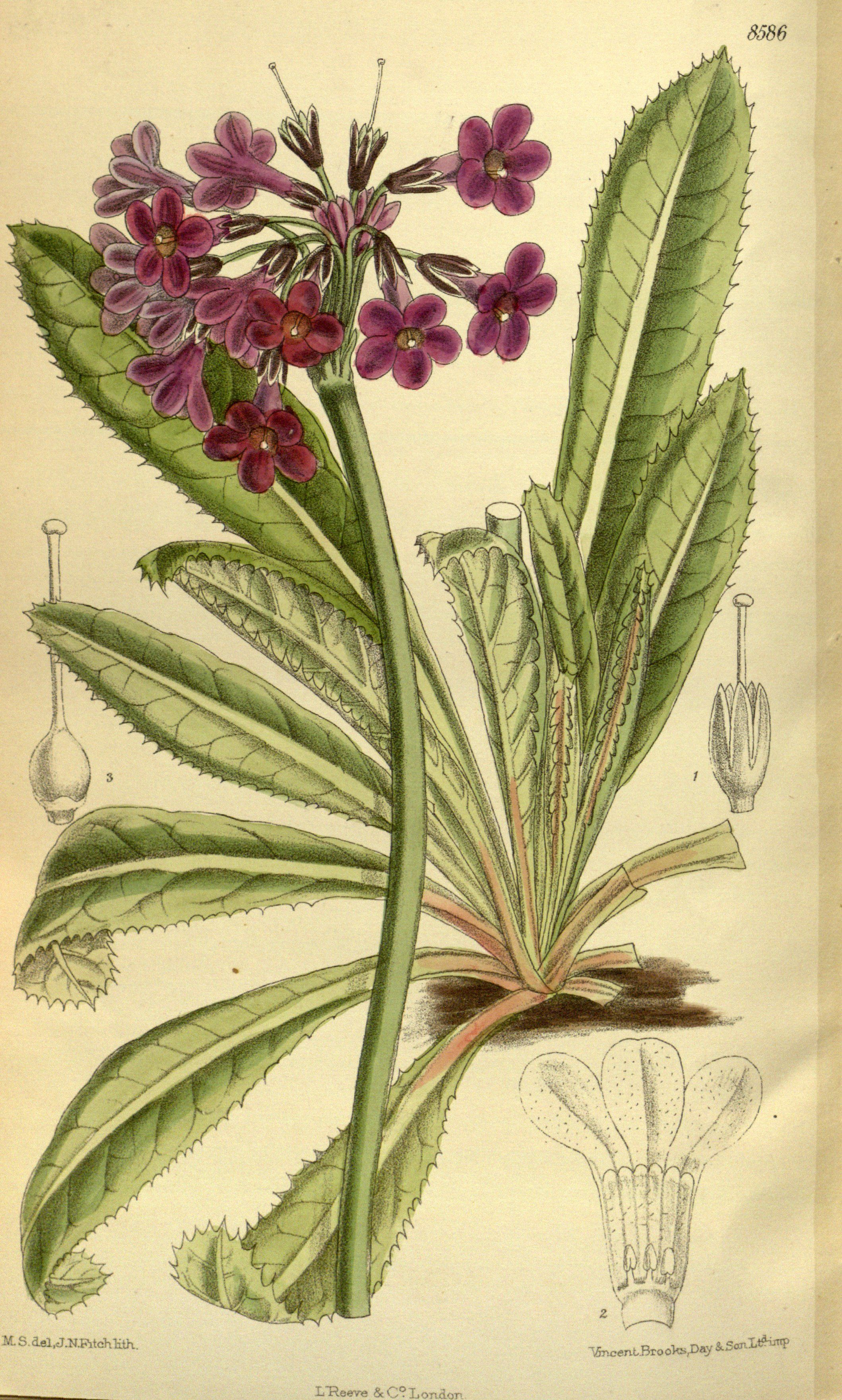 Primula vittata (= Primula secundiflora), Primulaceae